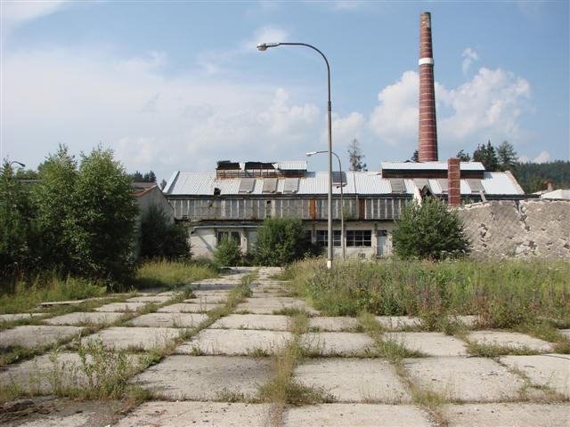 Sklárna Lenora - nyní